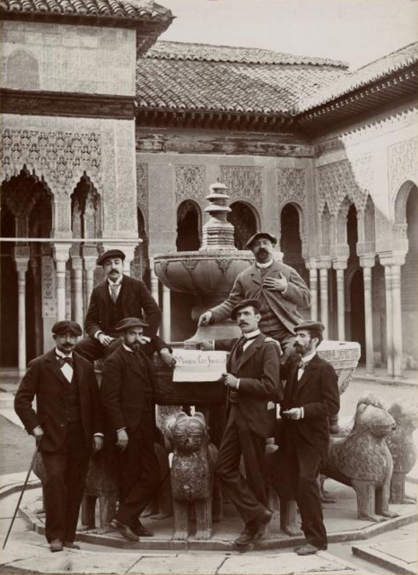 Grupo de personalidades carlistas en Granada